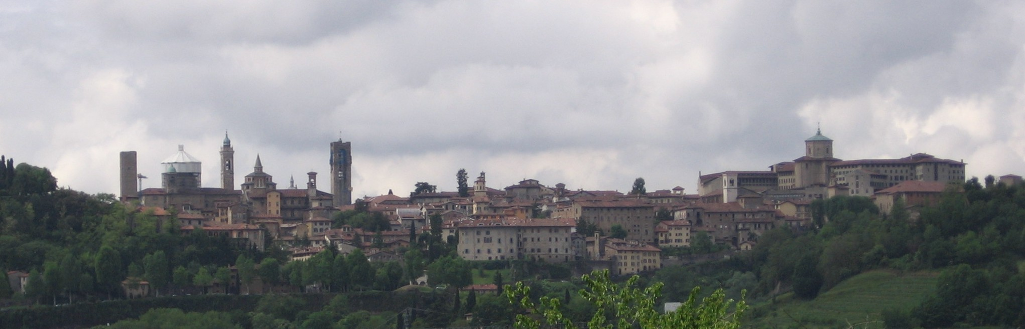 Bergamo, vista di città alta, Italia